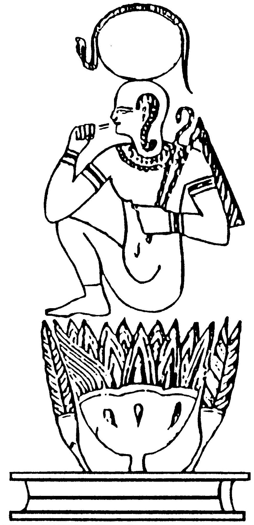 Harsomtus.